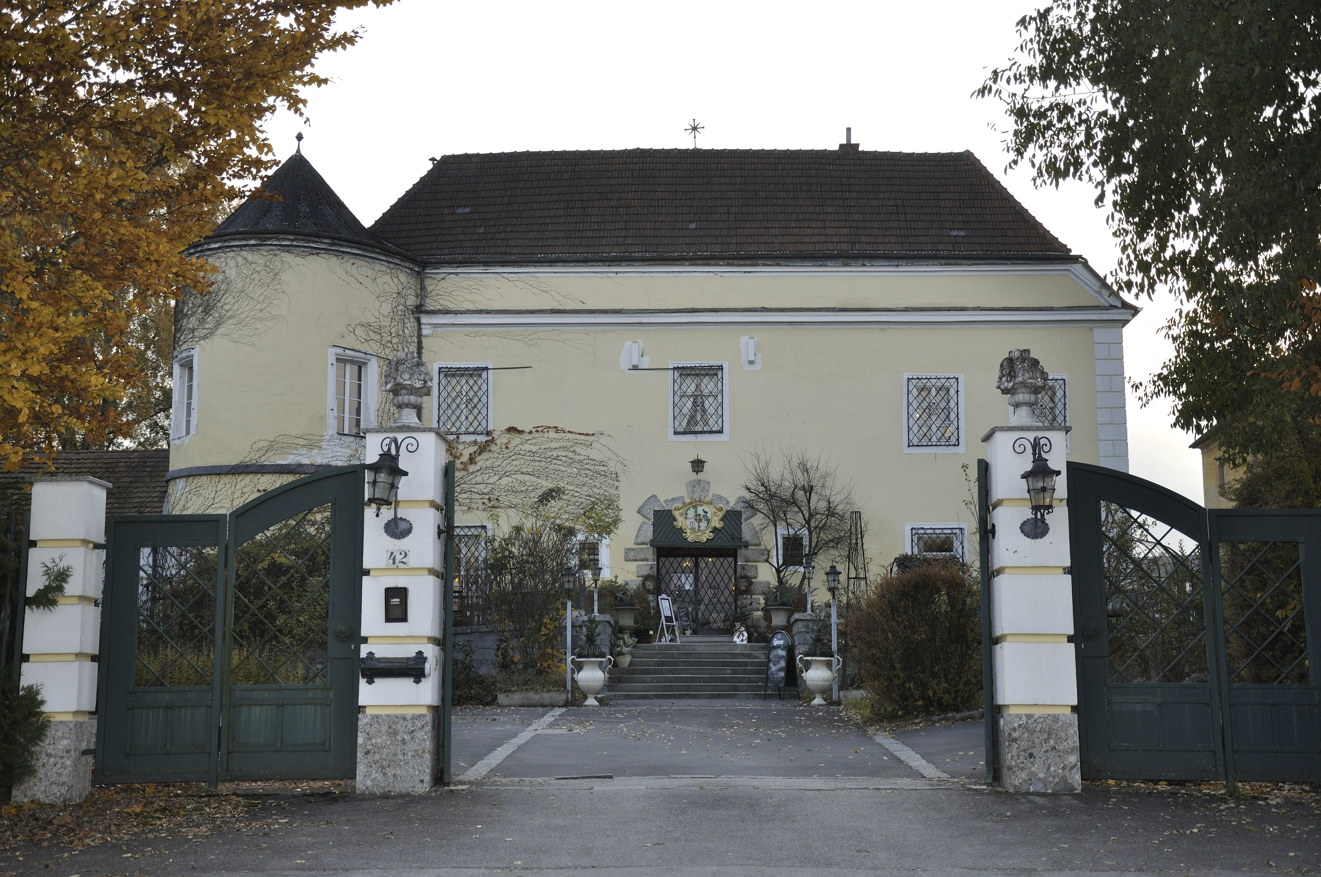 Schlossanlage Mühlgrub samt Nebengebäude